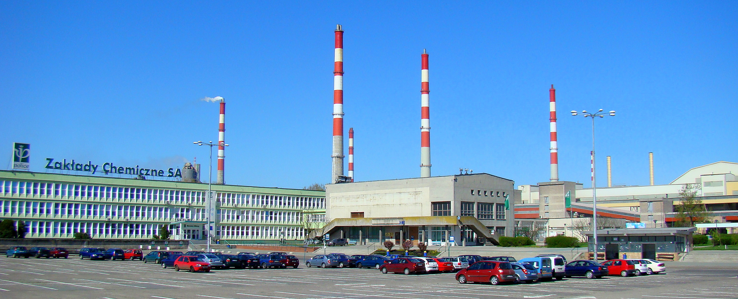 Zakłady Chemiczne Police, (Police, Województwo zachodniopomorskie), Polska